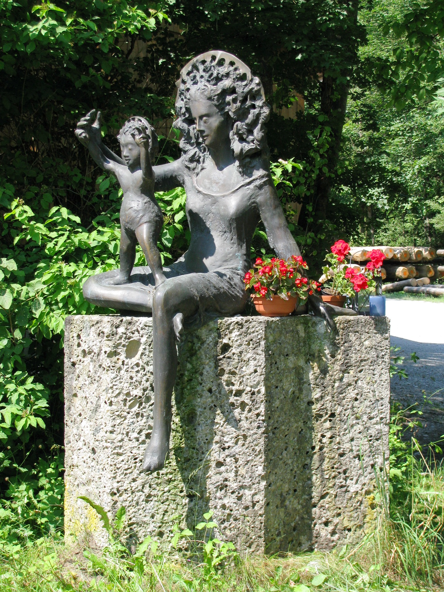 Marienskulptur von Anton Ferstl an der Marienbrücke Wolfratshausen